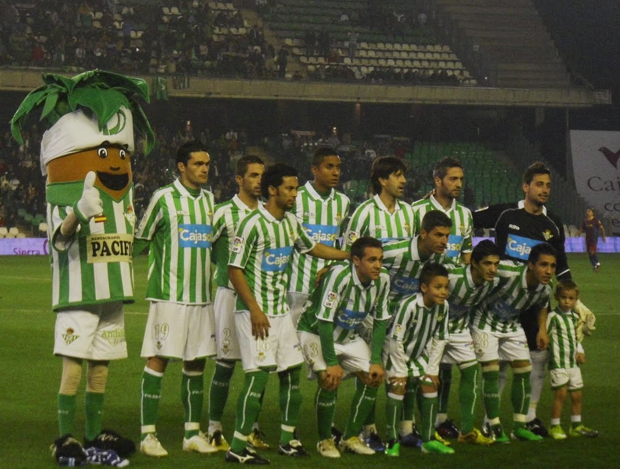 Alineación titular del Real Betis que derrotó por 3-1 al FC Barcelona en 1/4 de la Copa del Rey, temporada 2010-2011. Forman Casto (portero), Isidoro, Roversio, Belenguer, Nacho, Iriney, Arzu, Salva Sevilla, Ezequiel, Jorge Molina, y Jonathan Pereira.